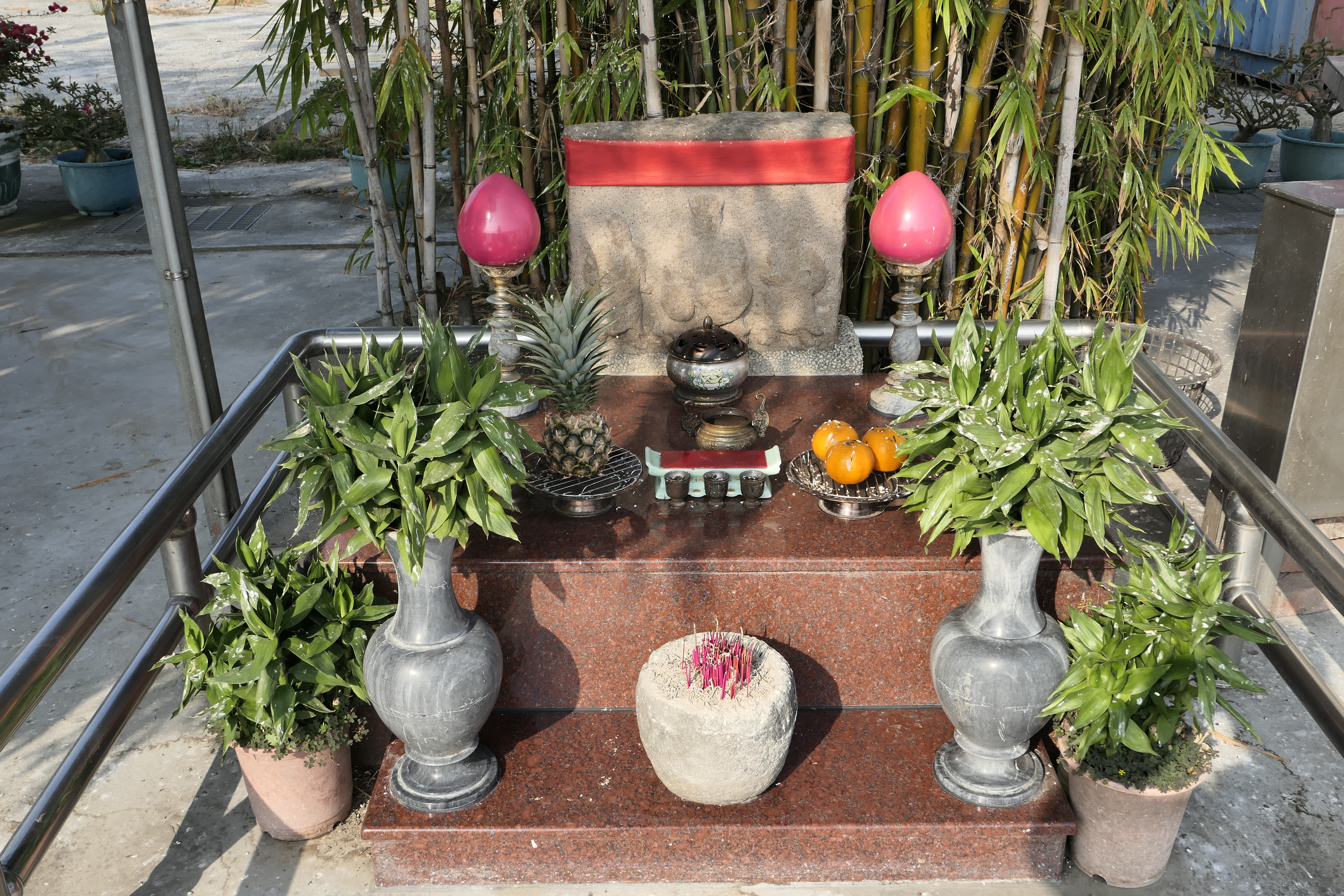 凹仔西安宮石頭祖師